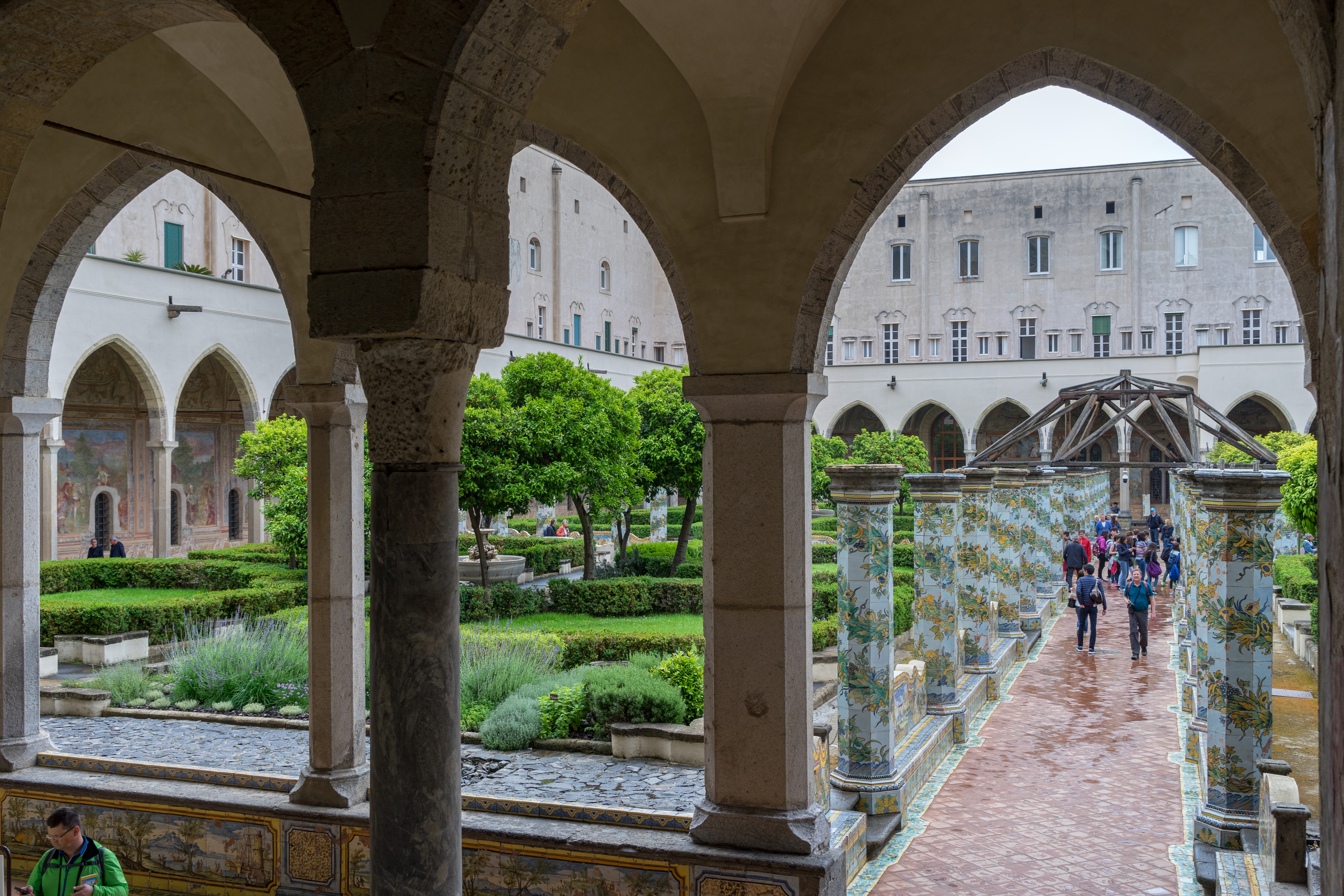 Naples - Santa Chiara - Cloitre - Vue générale